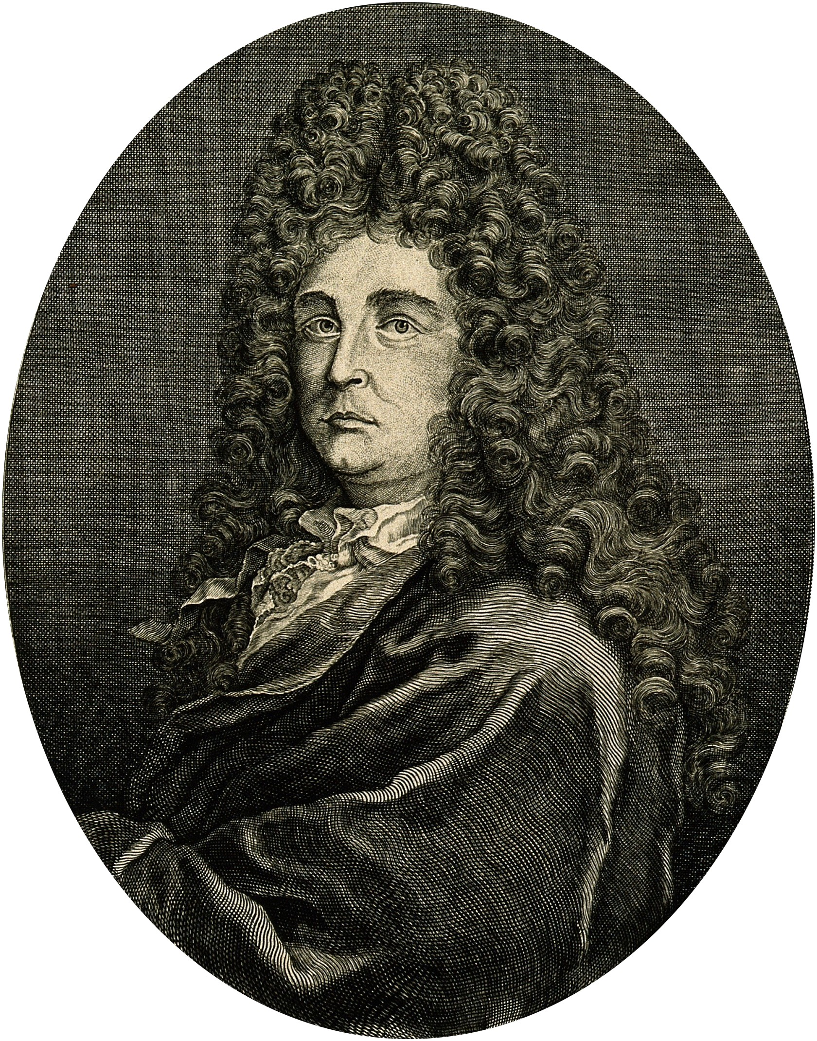 Roger Grant (oculist)